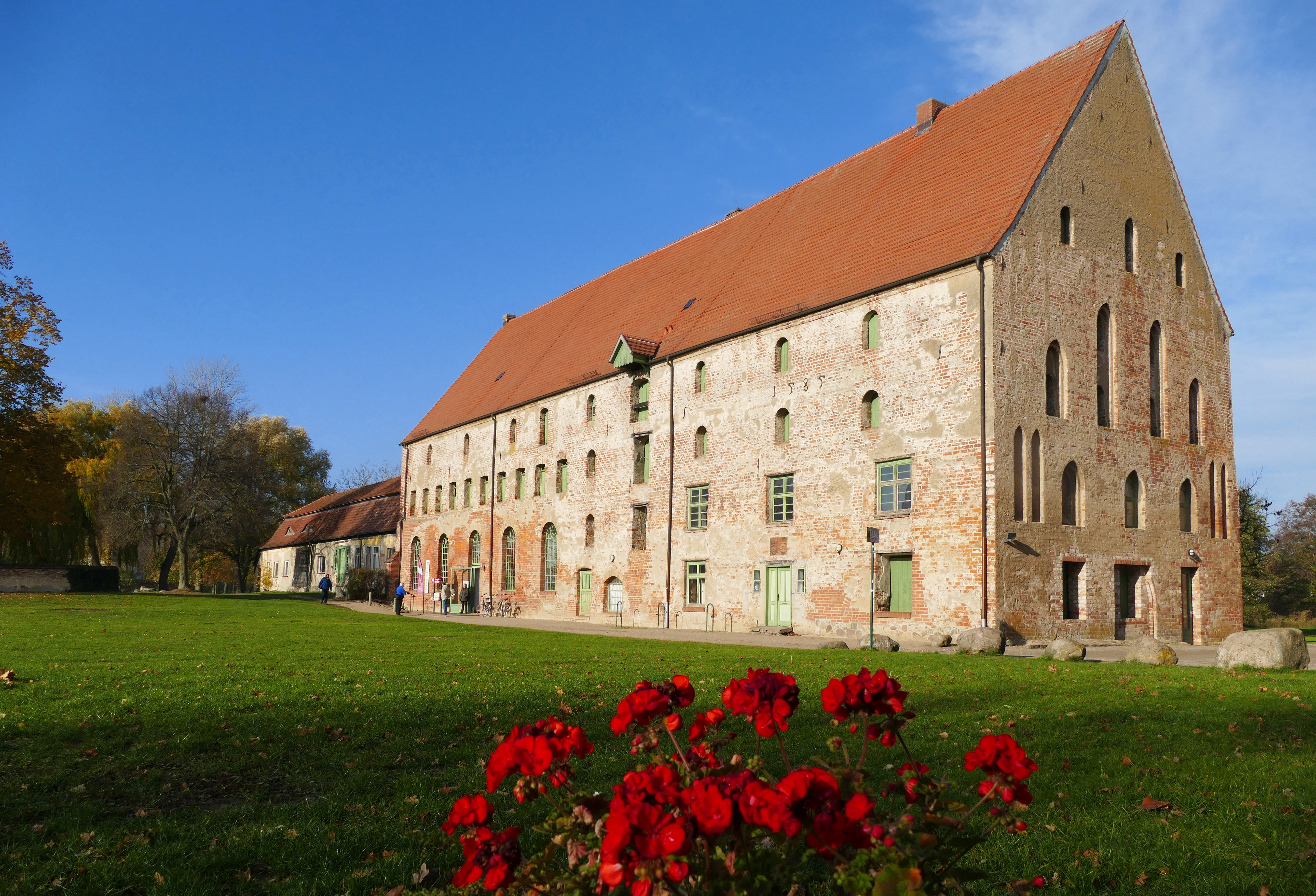 Schloss Dargun Wirtschaftsgebäude mit Laden